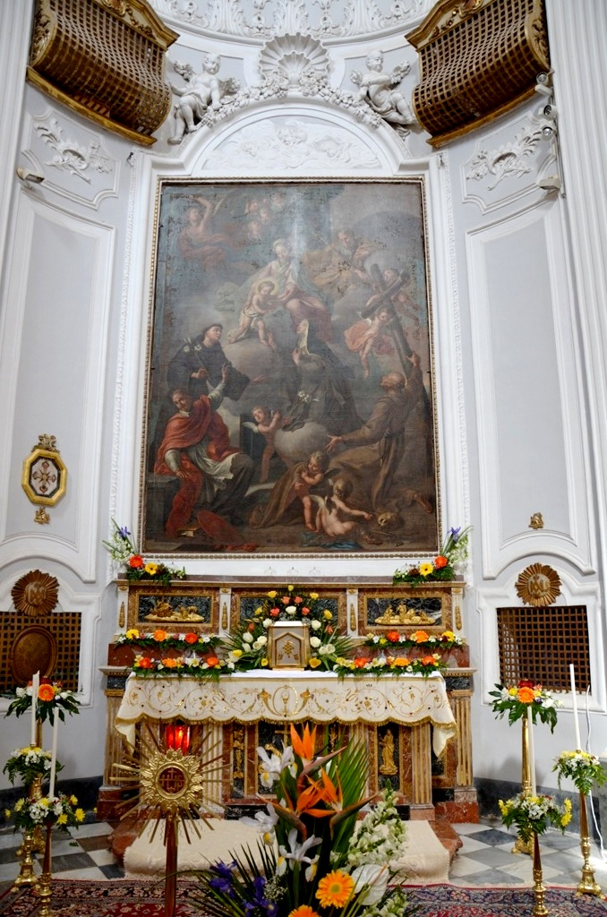 Tela con la Presentazione di Gesù Bambino a Santa Chiara (G.Borremans,1722); altare addobbato per il Giovedì Santo 2012